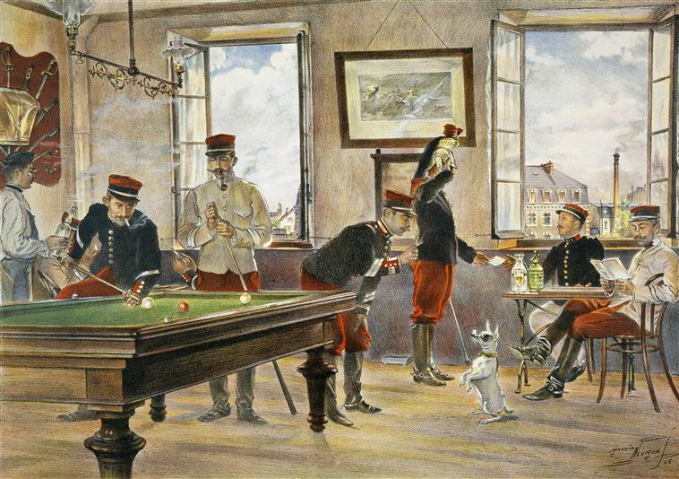 Sous-officiers de cuirassiers dans leur salle de réunion-cercle. Peinture conservée au musée de l'Armée à Paris.